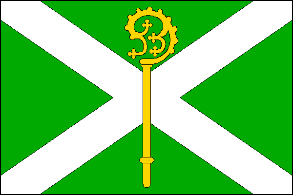 vlajka, Partutovice, okres Přerov